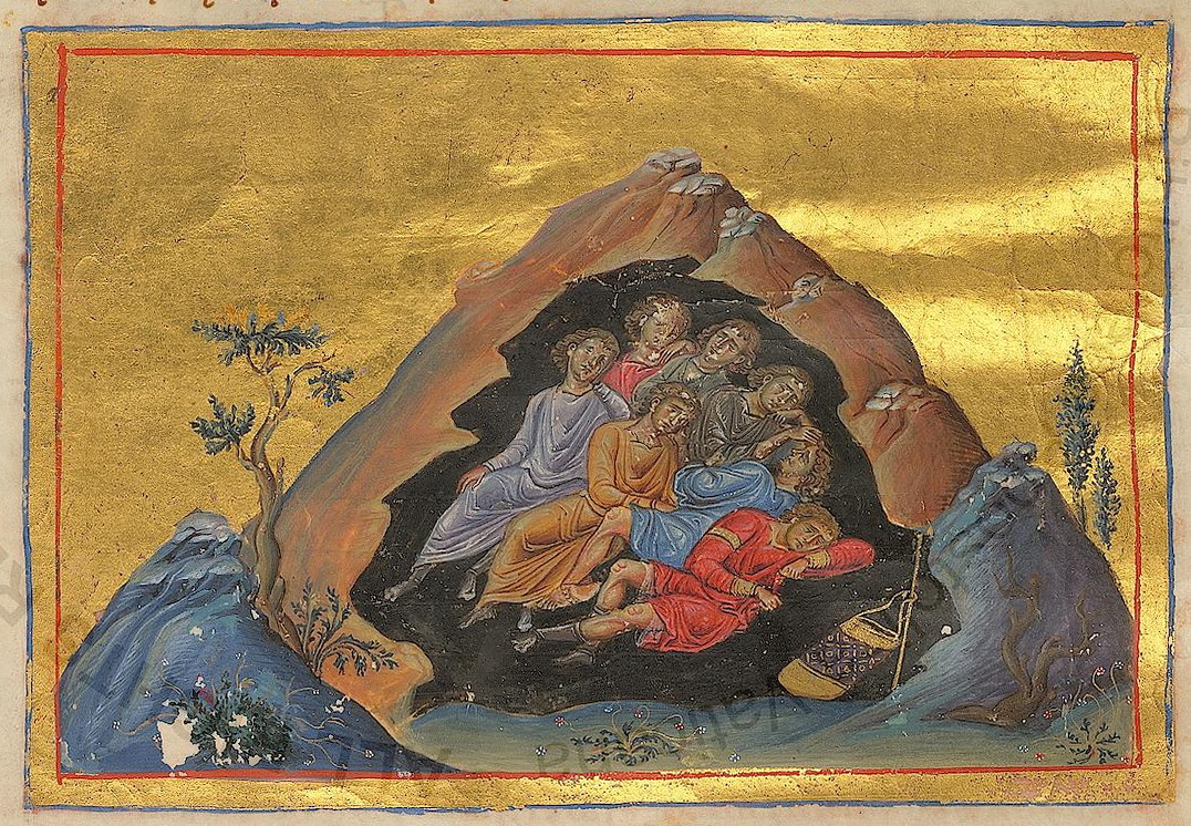 Константинополь. 985 г. Миниатюра Минология Василия II. Ватиканская библиотека. Рим.